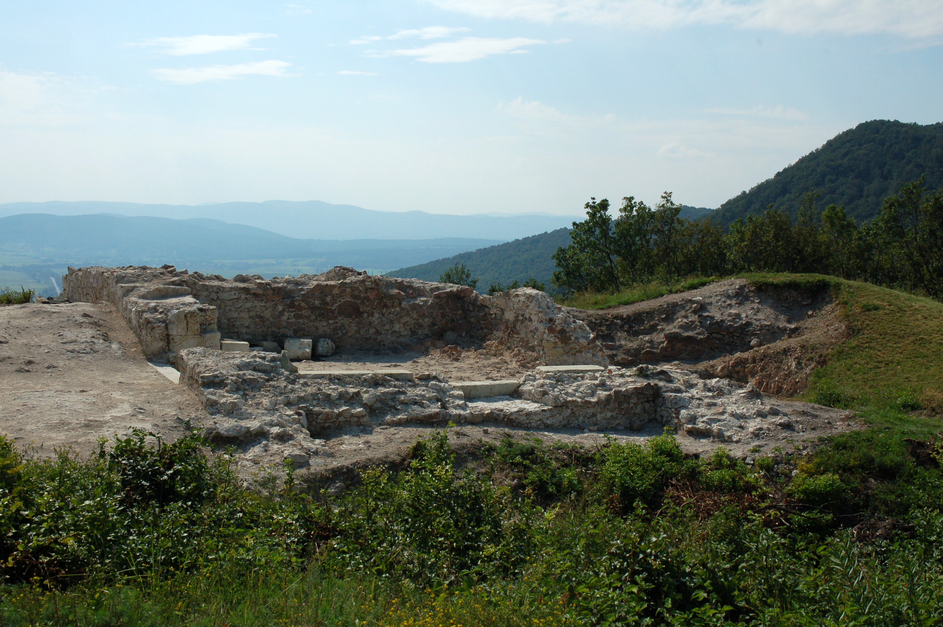 A Sátoraljaújhelyi vár feltárása 2010-ben.